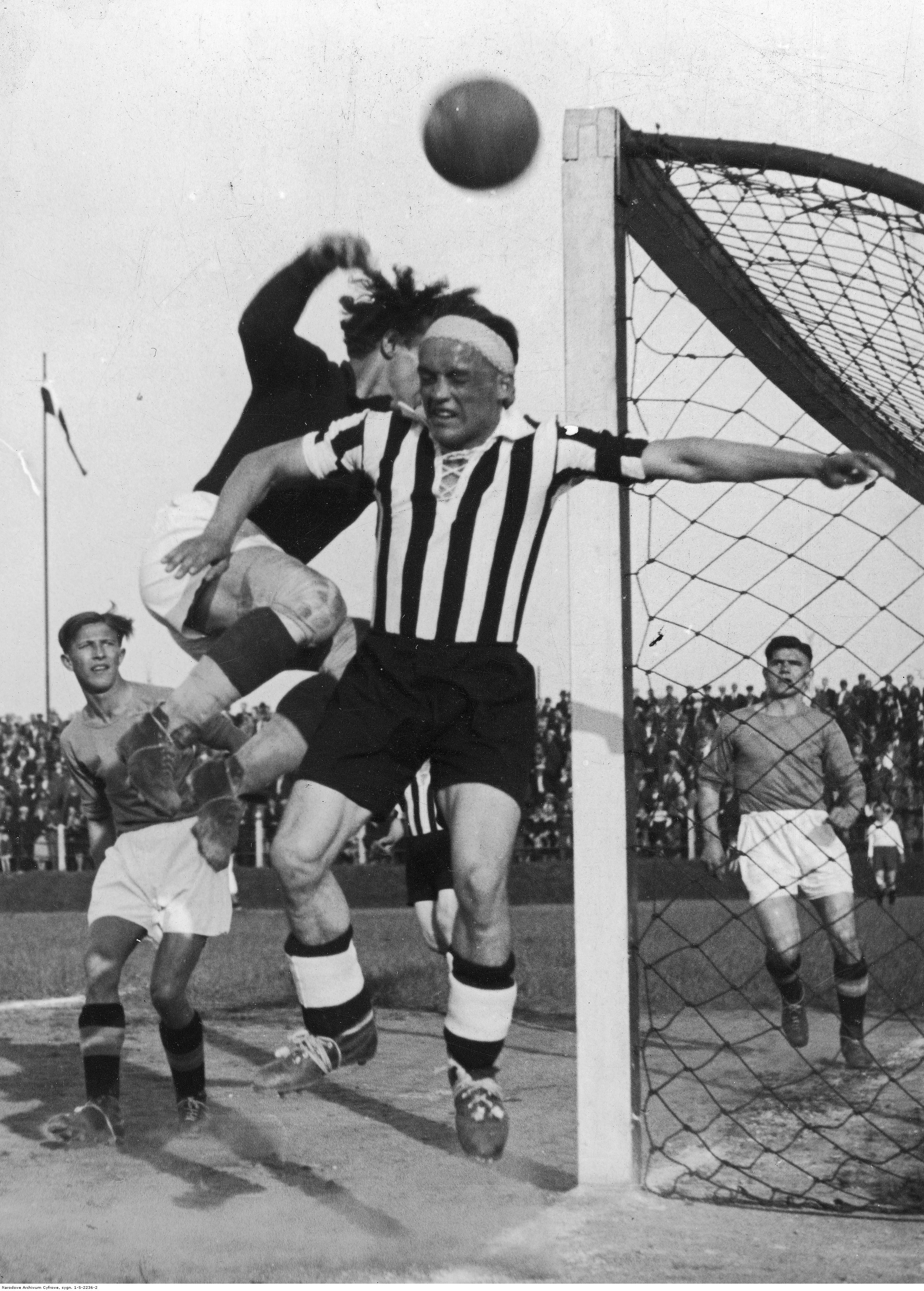 Fragment meczu. Akcja pod bramką Ruchu Wielkie Hajduki. Pojedynek Eryka Tatusia z Hofmanem.